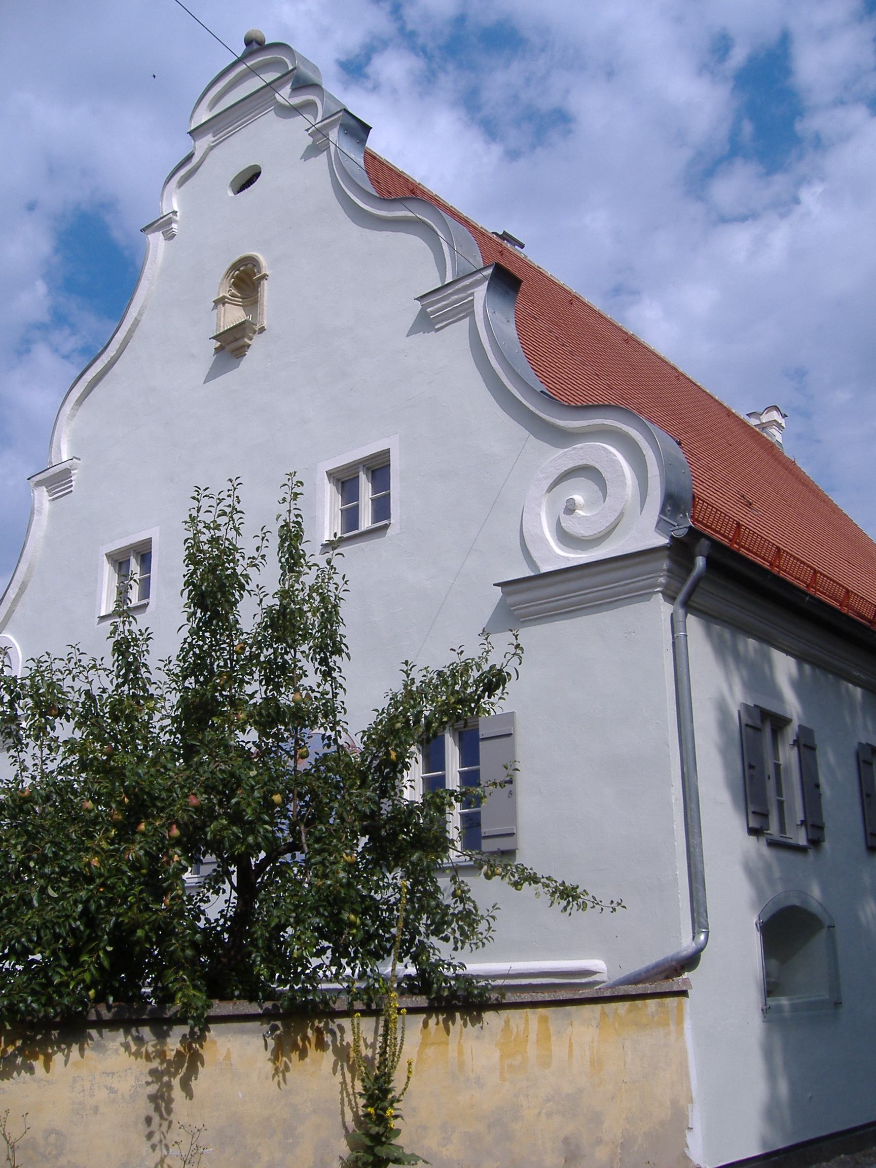 Alter Pfarrhof in Bertoldheim